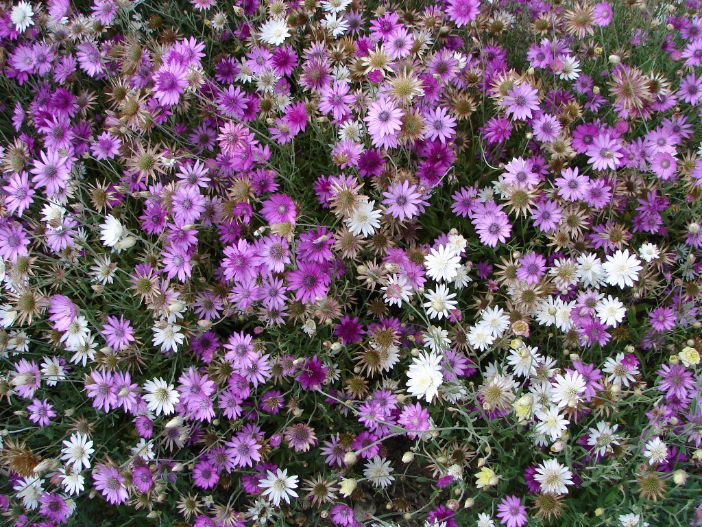 Xeranthemum annuum - suchokwiat roczny